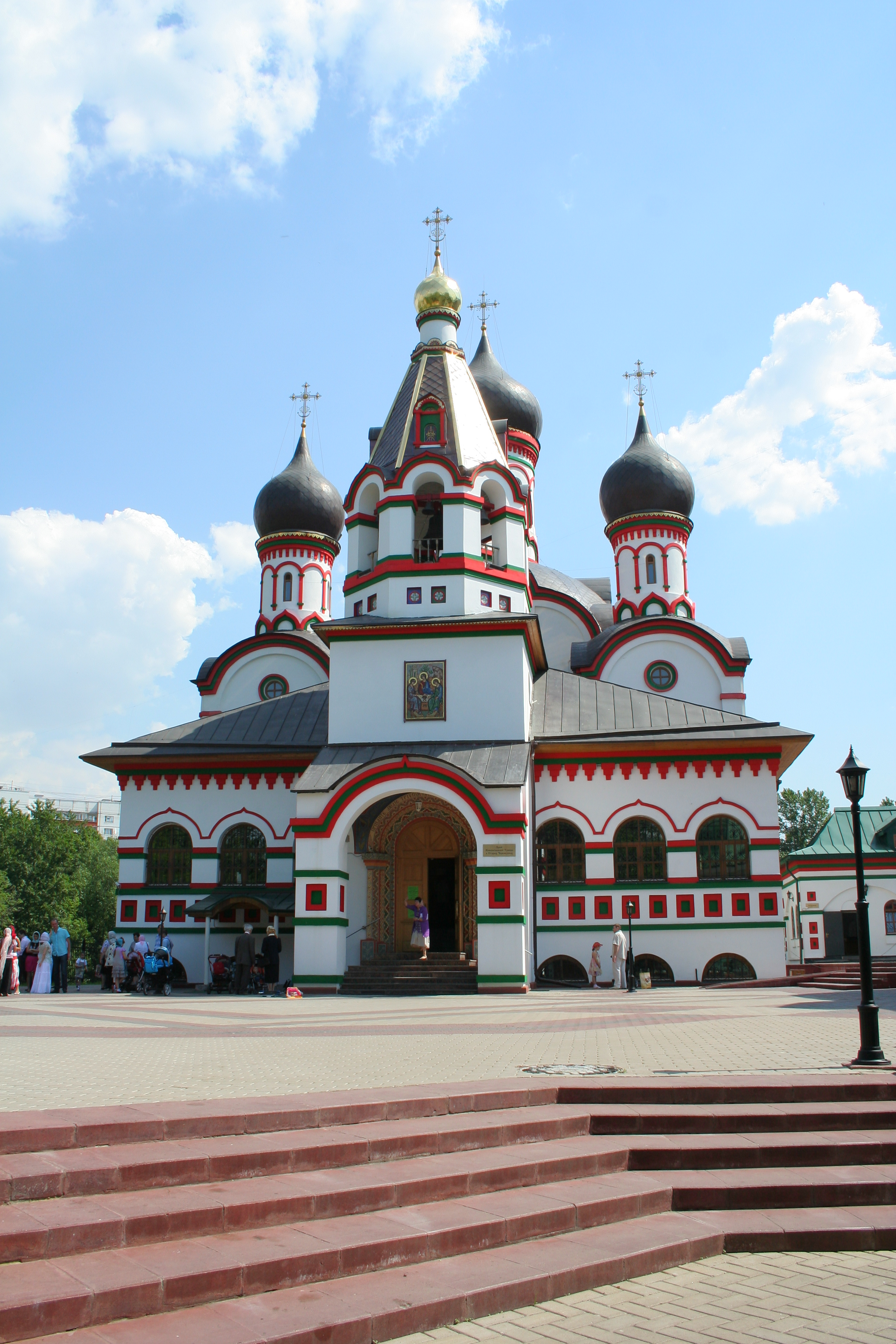 Kirche der Heiligen Dreifaltigkeit zu Staryje Tscherjomuschki, Moskau.